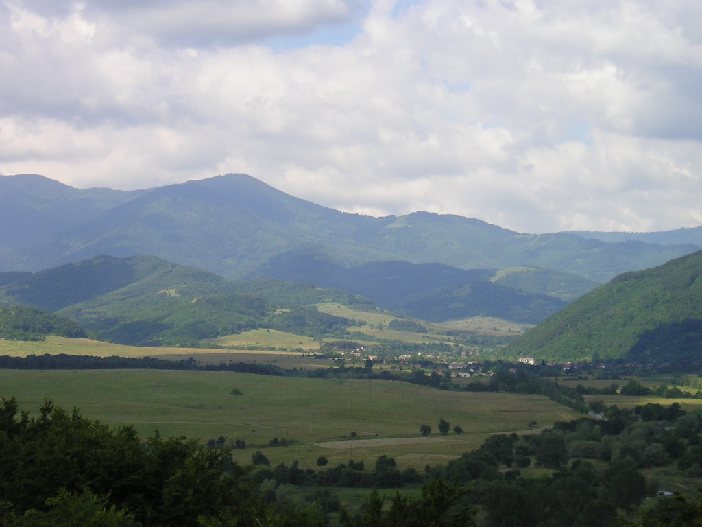 Изглед към резерват Чупрене Дата: 20 юни 2005 г.